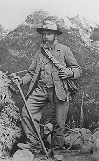 Le guide Peter Bohren (1822-1882)